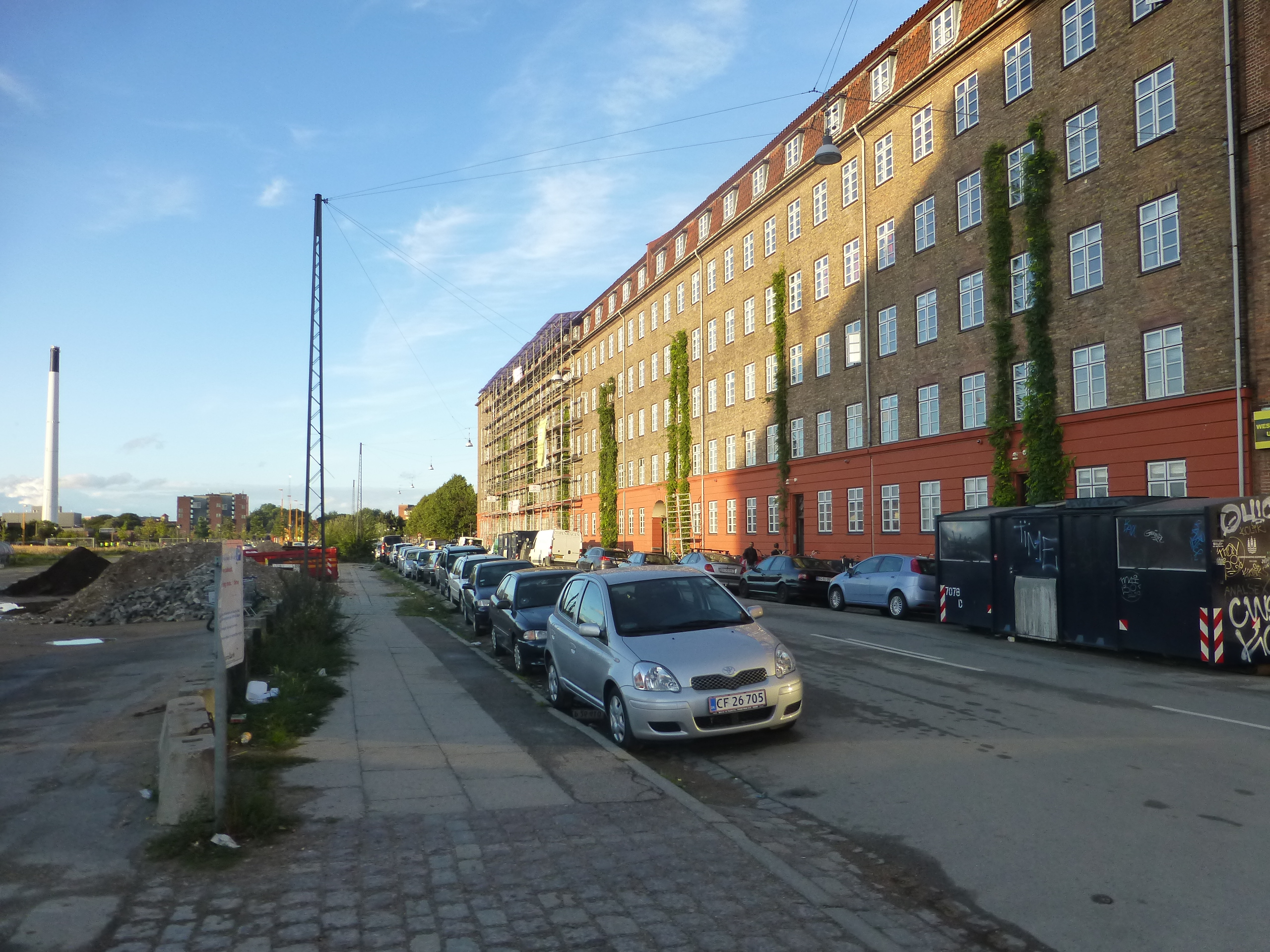 The street Borgmestervangen in Nørrebro in Copenhagen.